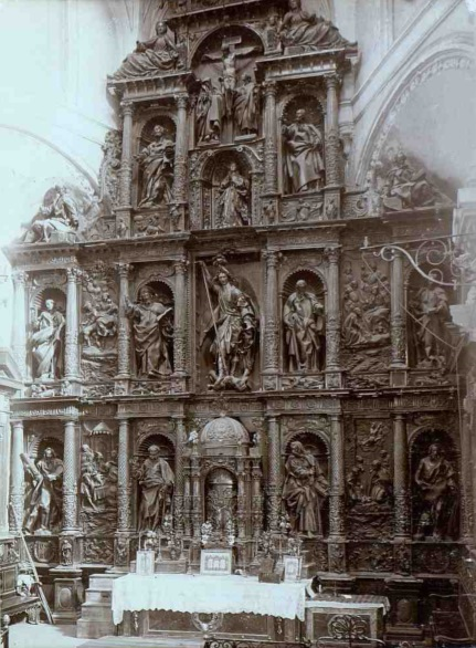 Antiguo retablo de la iglesia parroquial de Peñaranda de Bracamonte, destruido posteriormente en un incendio